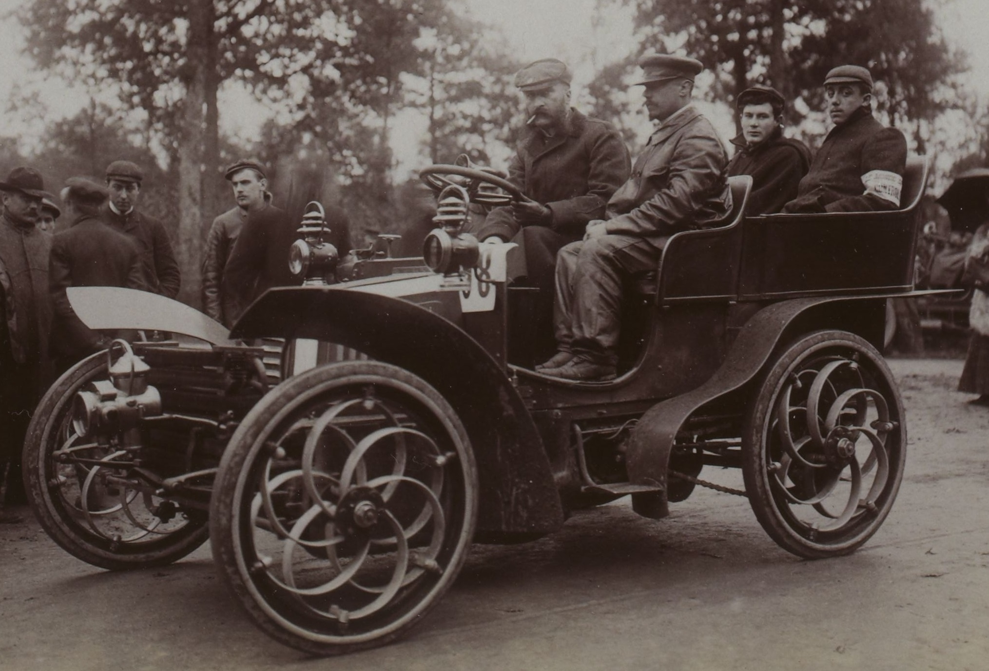 [Collection Jules Beau. Photographie sportive] : T. 23. Année 1903 / Jules Beau : F. 47v. [Kilomètre, Dourdan, 21 octobre 1903]